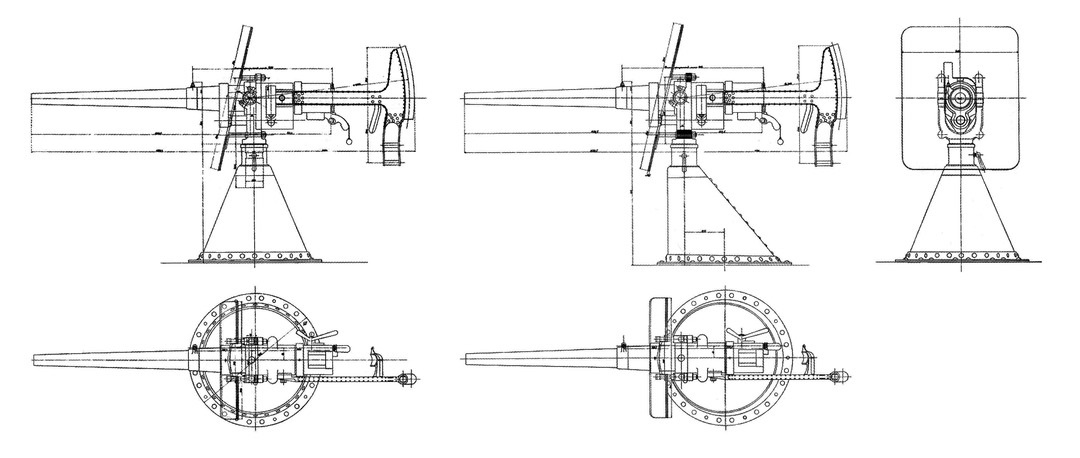 Создано по материалам архивов РГАВМФ (Ф. 421, Оп.12) и фондов музея ГОЗ